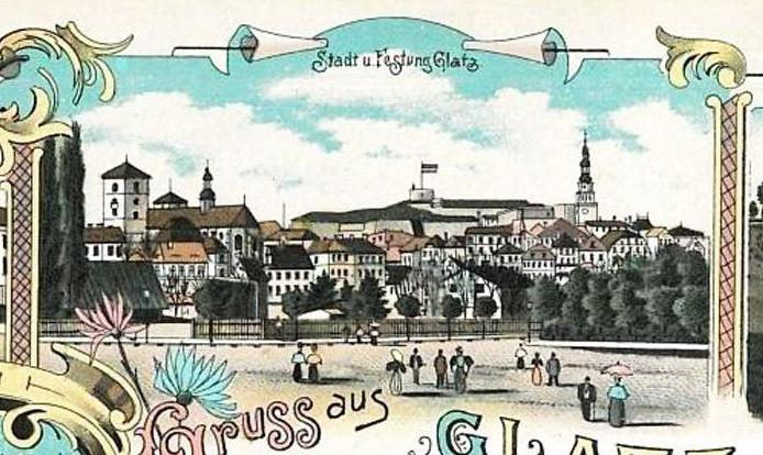 Viehmarkt in Glatz